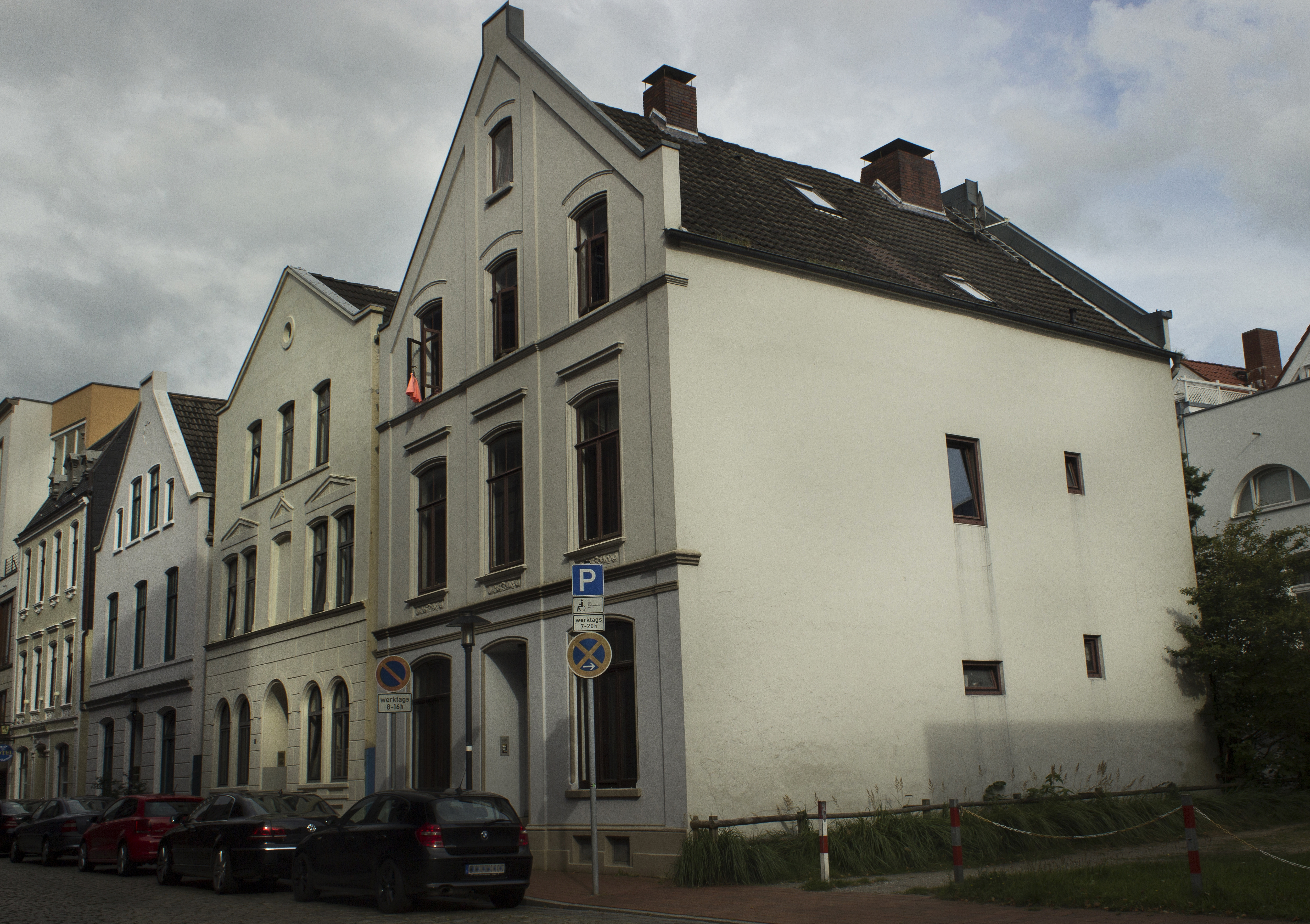 Wohnhausgruppe in Bremerhaven, An der Karlstadt 29Die Denkmalgruppe ist ein geschütztes Kulturdenkmal in der Freien Hansestadt Bremen, mit der Nr. 1521 beim Landesamt für Denkmalpflege registriert. Wohnhausgruppe An der Karlstadt 29